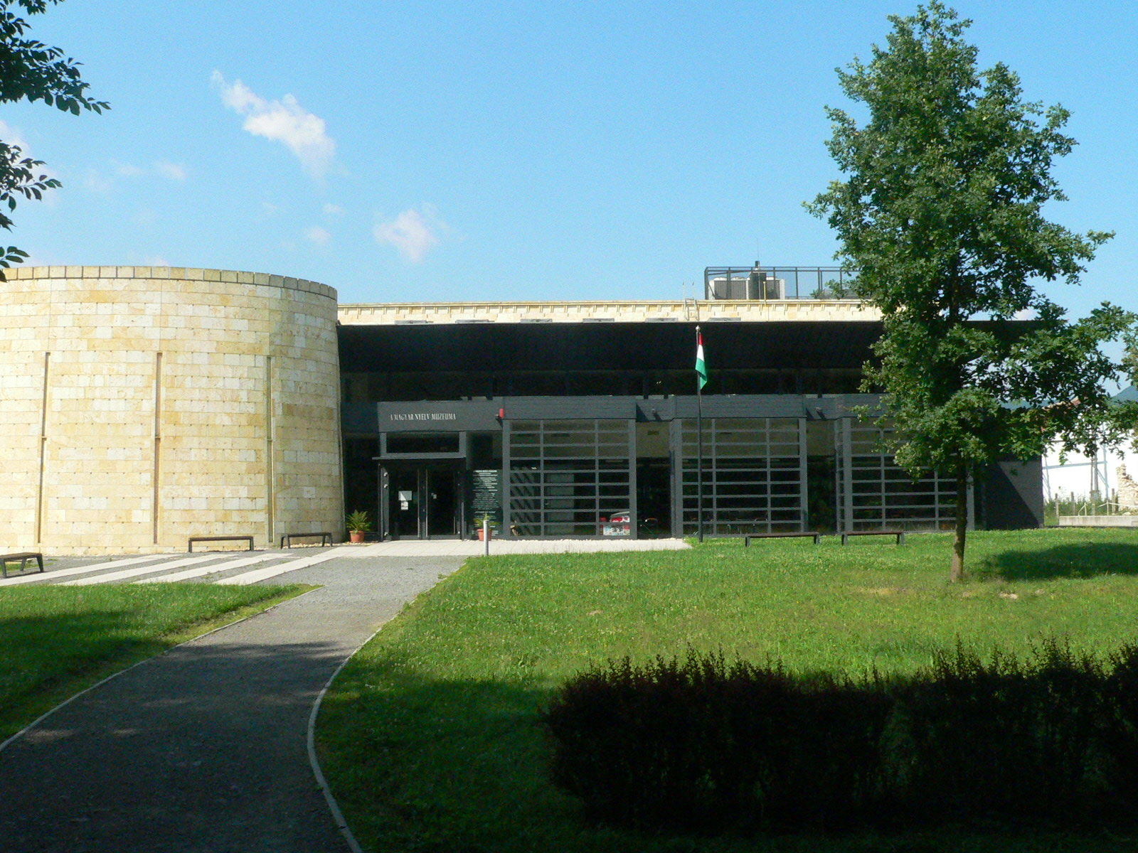 A Magyar Nyelv Múzeuma bejárata Sátoraljaújhelyen